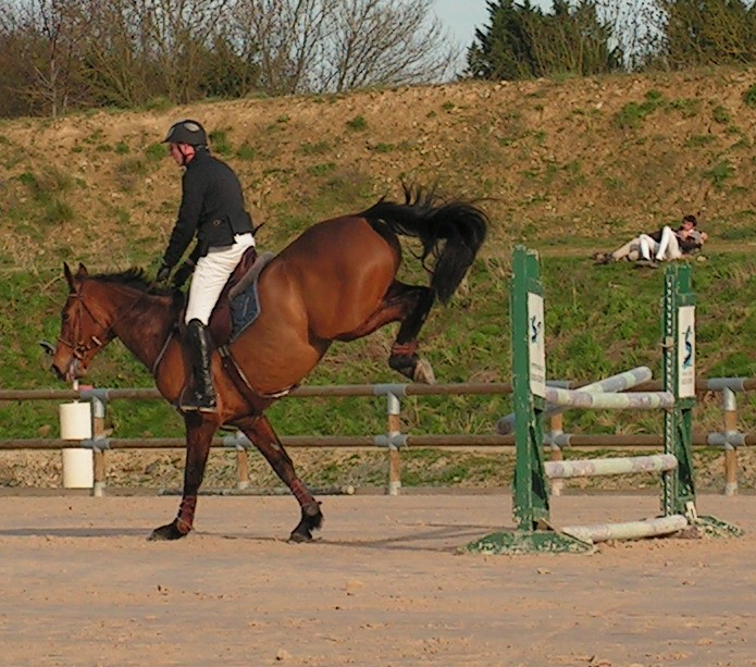 saut d'obstacle à Niort en France. Une faute qui vaut 4 points : un barre qui tombe